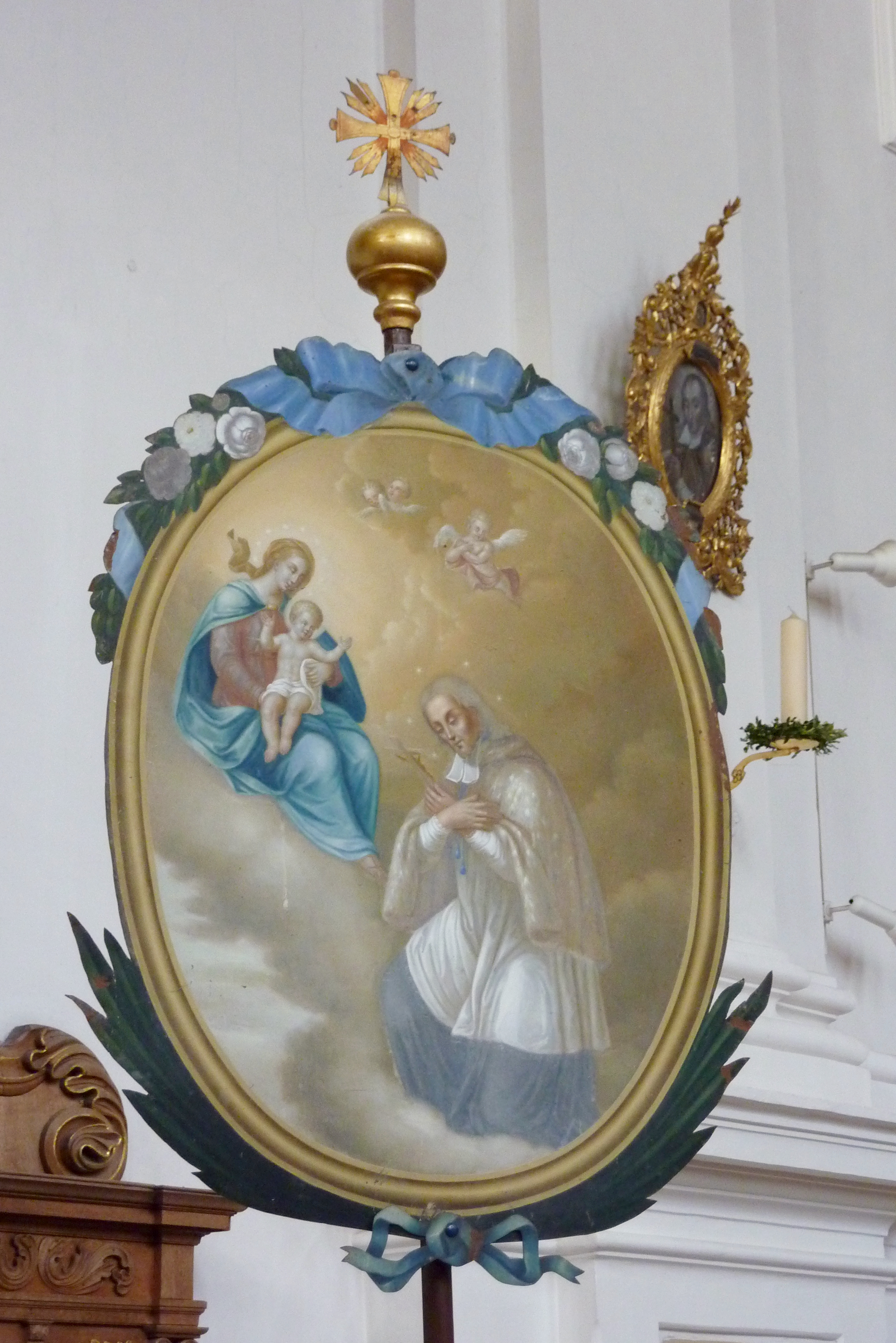 Ehemalige Damenstiftskirche, katholische Pfarrkirche St. Johannes Baptist und Johannes Evangelist in Edelstetten in der Gemeinde Neuburg an der Kammel im schwäbischen Landkreis Günzburg (Bayern/Deutschland), Bruderschaftstafel der Nepomuk-Bruderschaft aus der 1. Hälfte des 19. Jahrhunderts